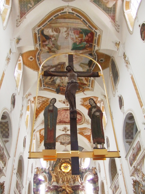 Ursberg, Klosterkirche, romanische Kreuzigungsgruppe, um 1250